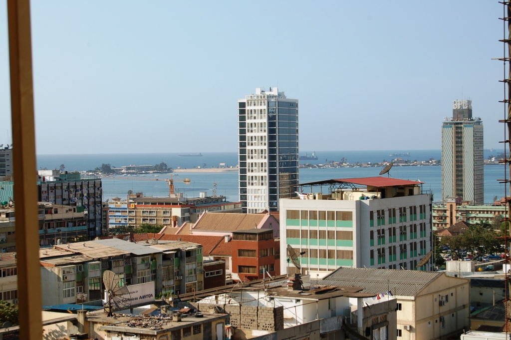 Blick über den Osten Luandas, Angola, im Hintergrund die Halbinsel Restinga